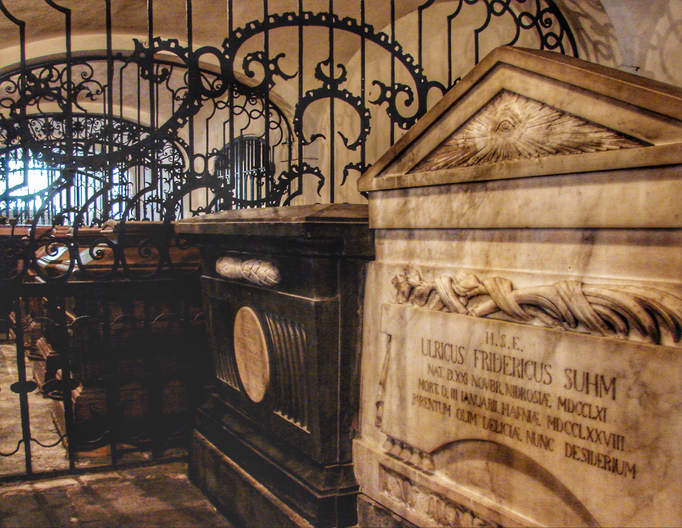 Peter Frederik Suhm og sønnen Ulrik Frederiks sarkofager i Christians Kirkes krypt, Christianshavn, Danmark